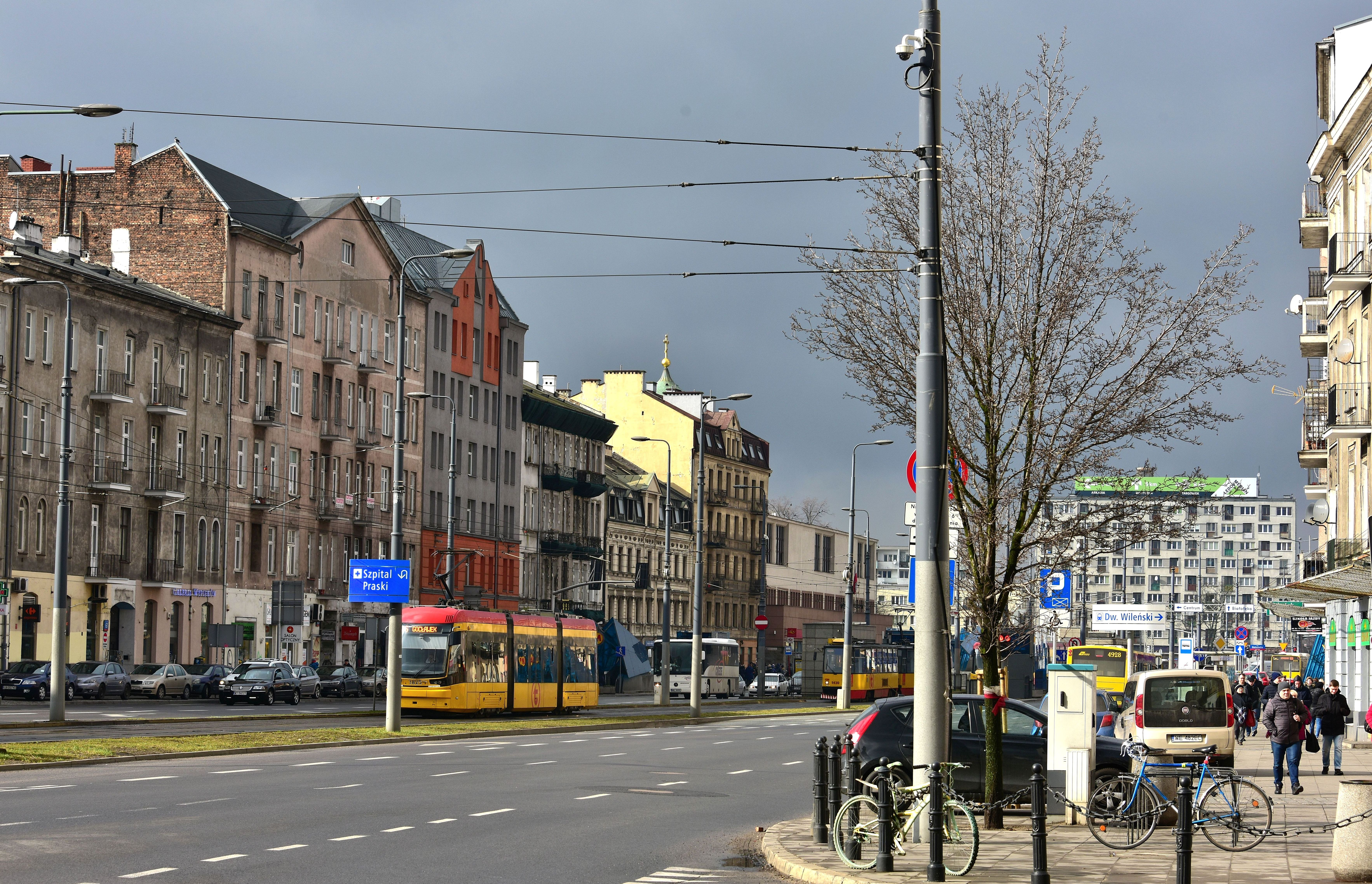 Ulica Targowa w Warszawie